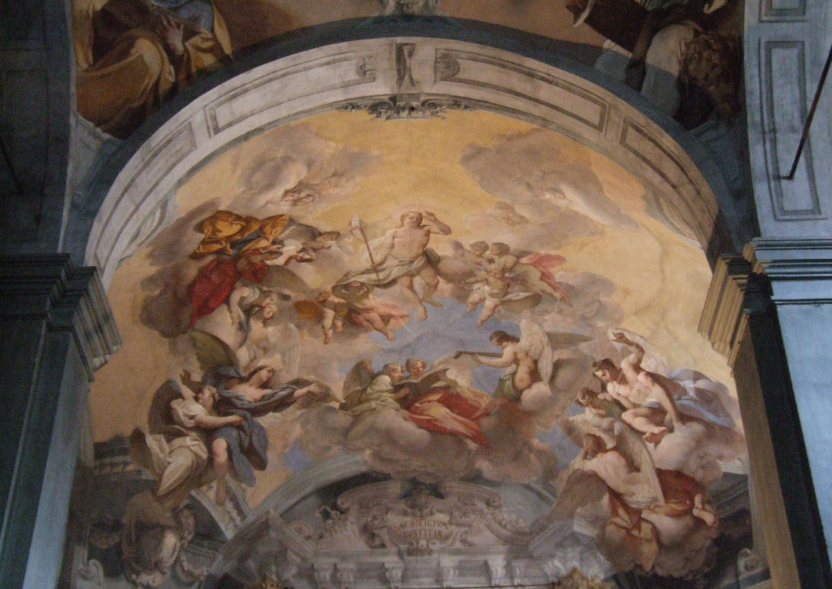 San Filippo, Pistoia, Italy